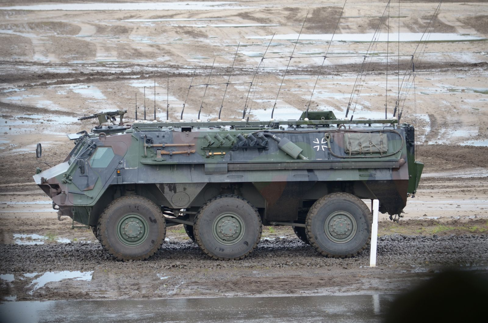 Eindrücke von der ILÜ 2012 der BW 24.09.2012)